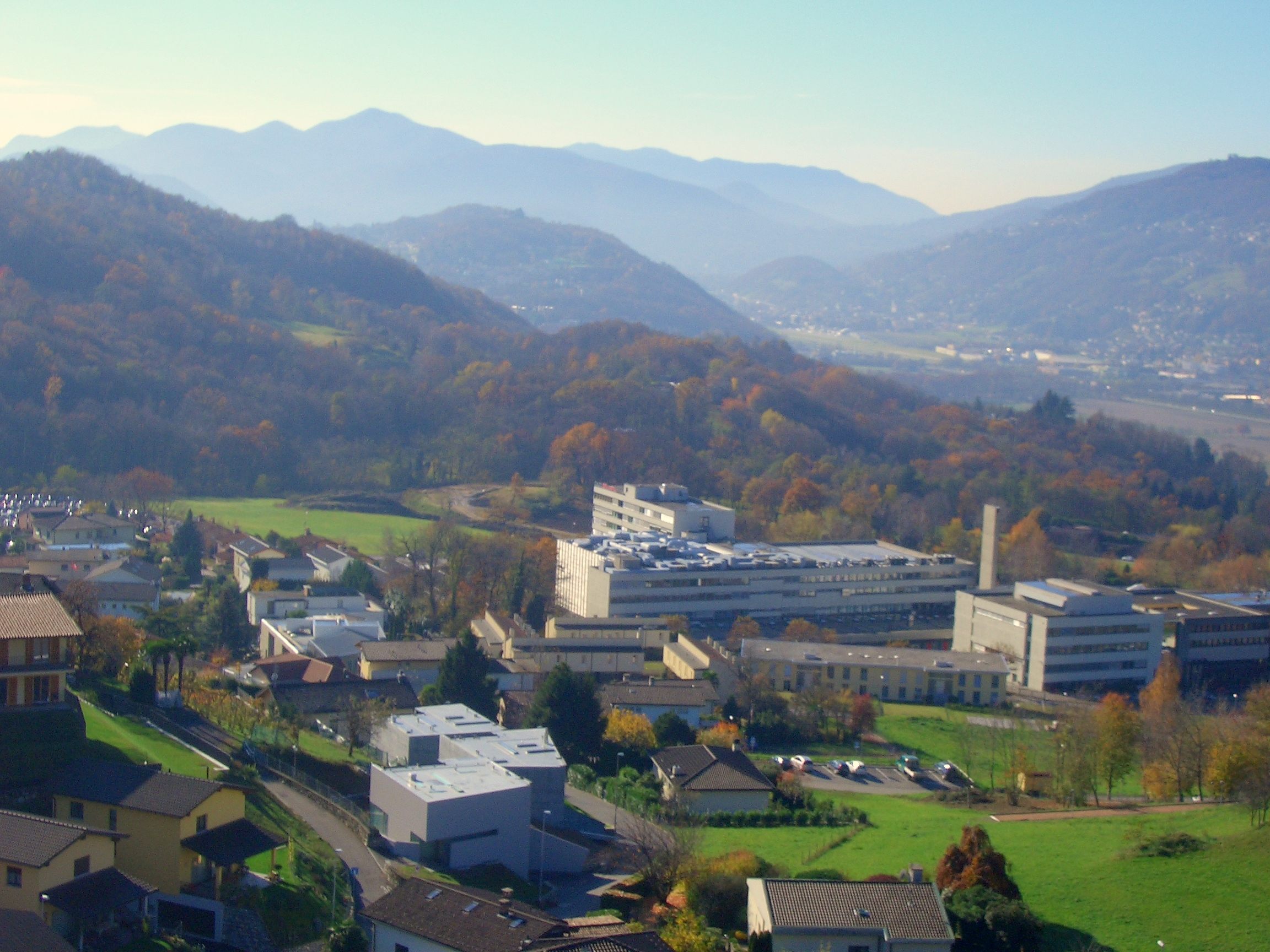 Studi Televisione Svizzera Italiana